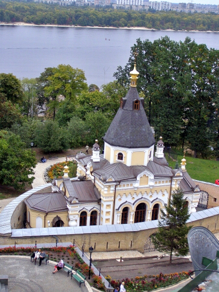 Церковь живоносного источника Киево-Печерской лавры